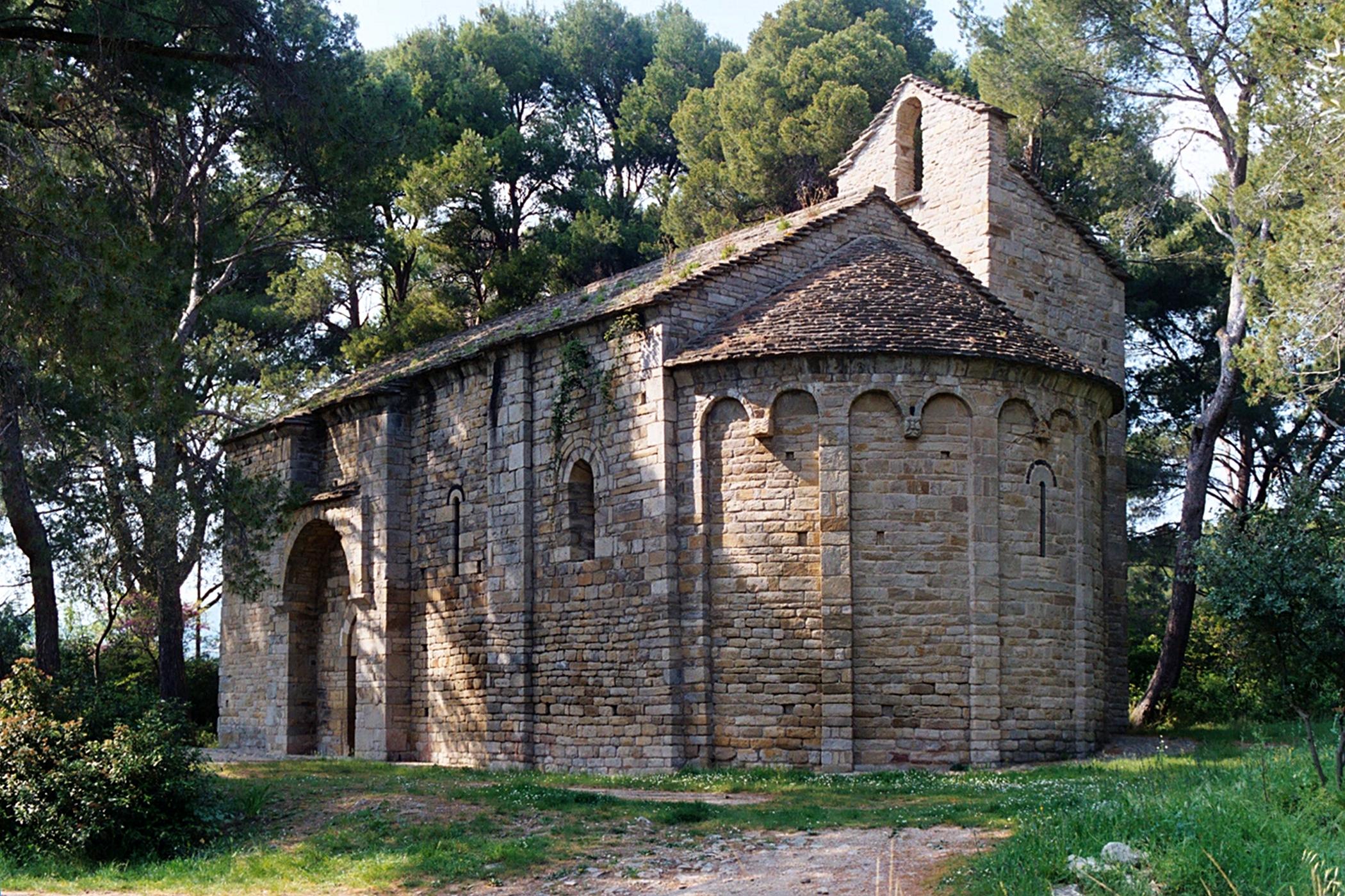 France - Languedoc - Hérault - Chapelle Saint-Germain de Cesseras